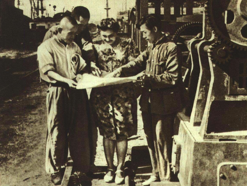 195103 妮娜·波尔达芙车瓦指导苏联大连铁路分厂